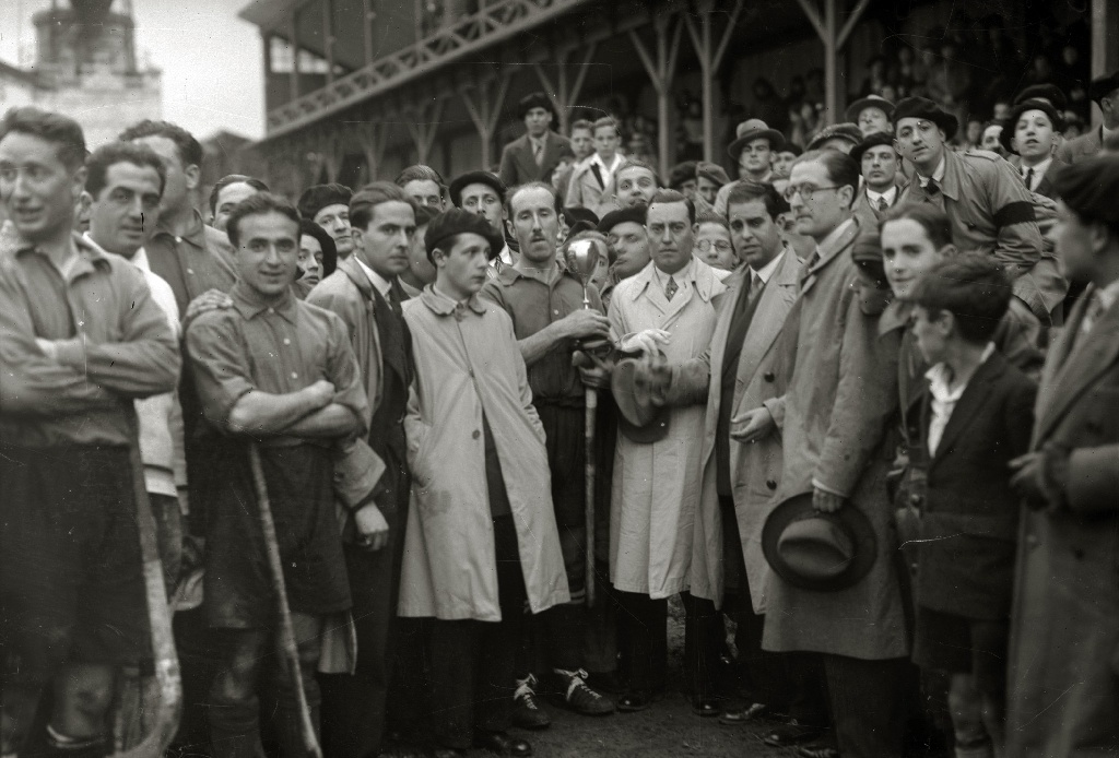 Título original: Partido de hockey en el campo de Atotxa (6/8) Localización: San Sebastián (Guipúzcoa)